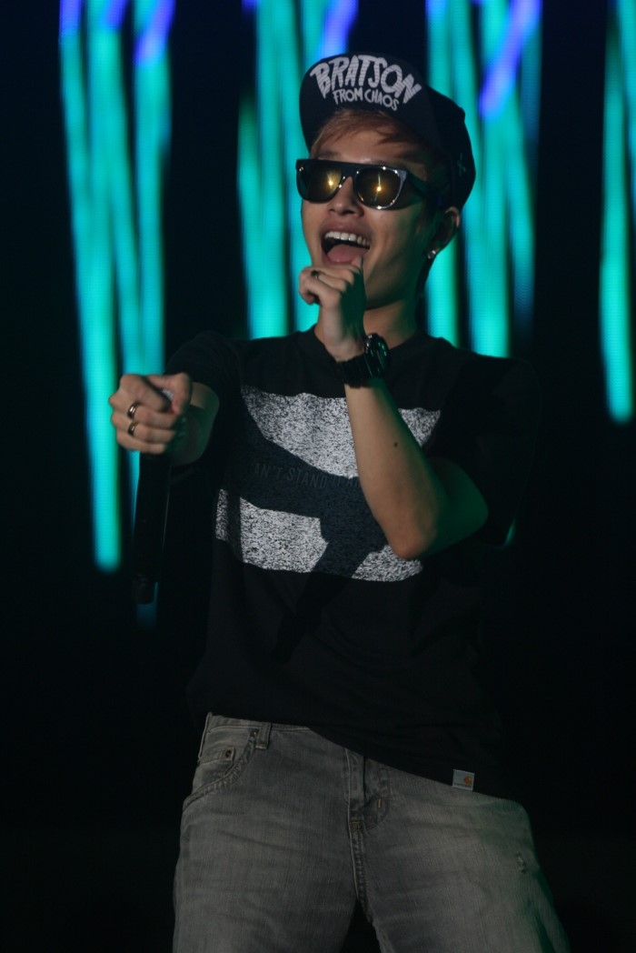 래퍼 사이먼 디